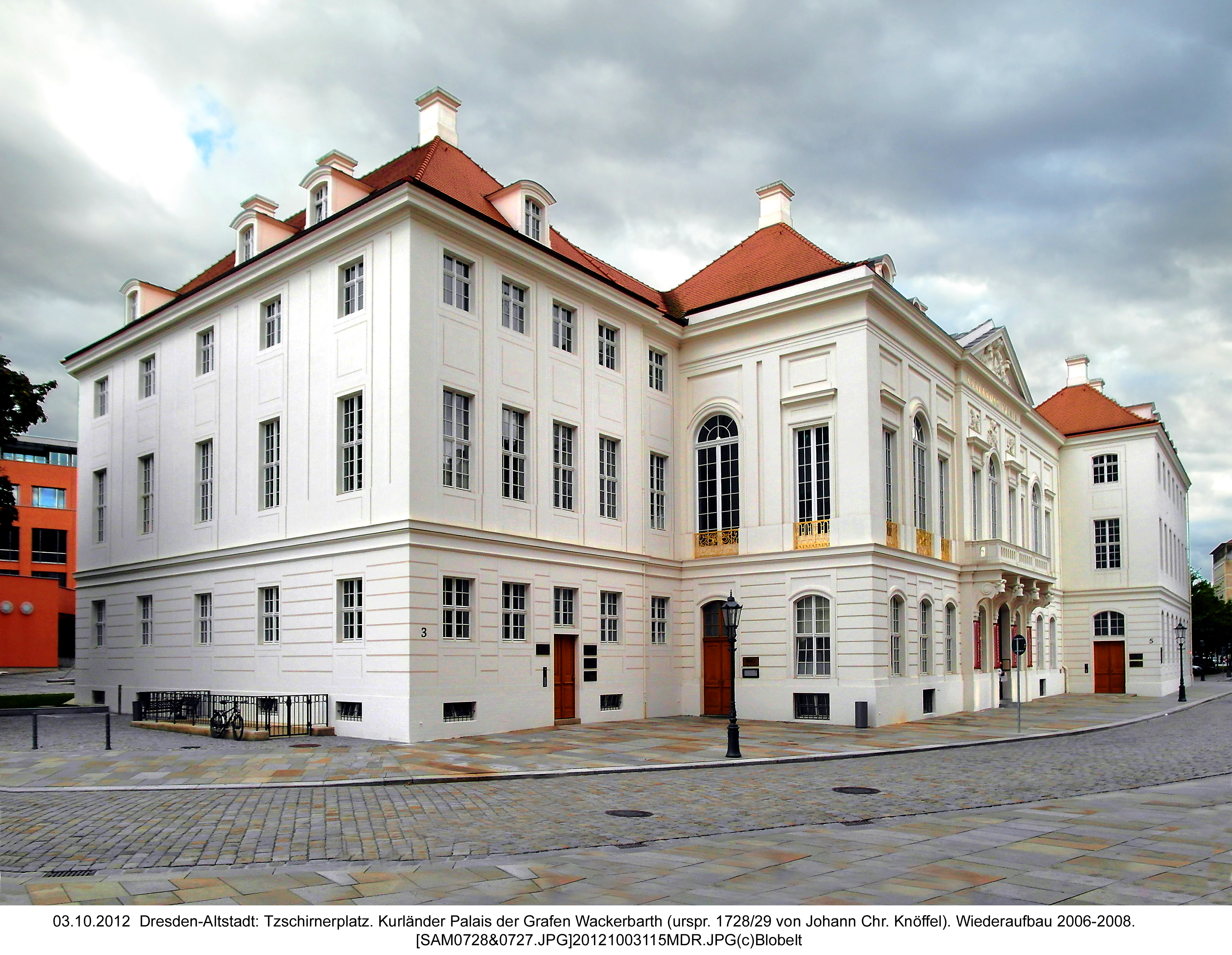 03.10.2012 Dresden-Altstadt: Tzschirnerplatz. Kurländer Palais der Grafen Wackerbarth (urspr. 1728/29 von Johann Chr. Knöffel). Wiederaufbau 2006-2008. [SAM0728&0727.JPG]20121003115MDR.JPG(c)Blobelt